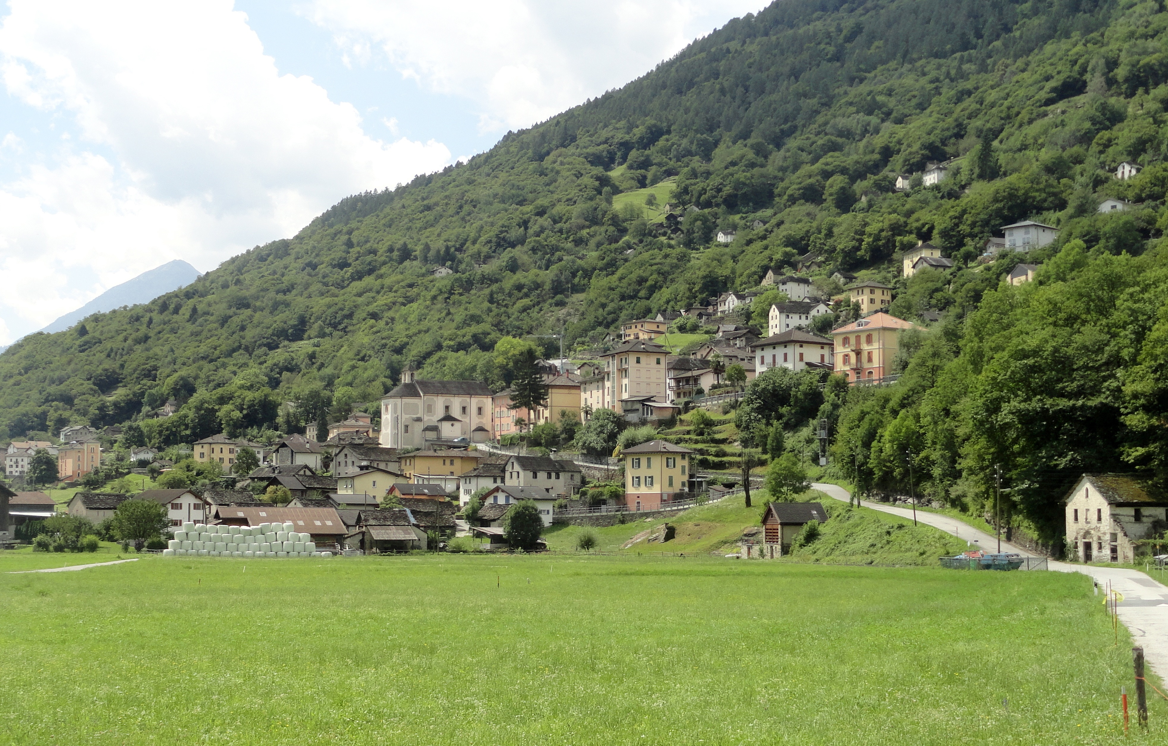 Semione